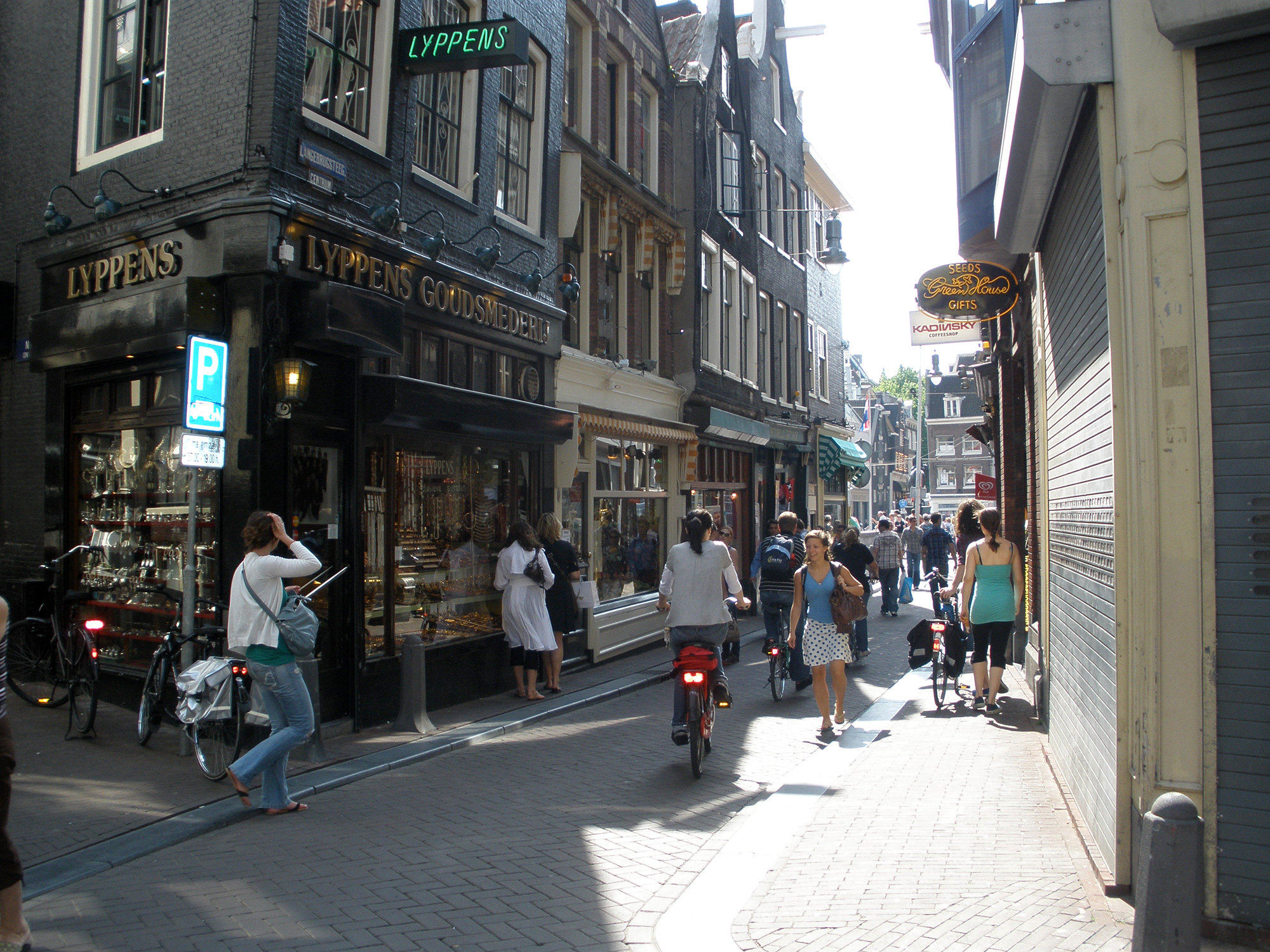 Langebrugsteeg, a small street in Amsterdam